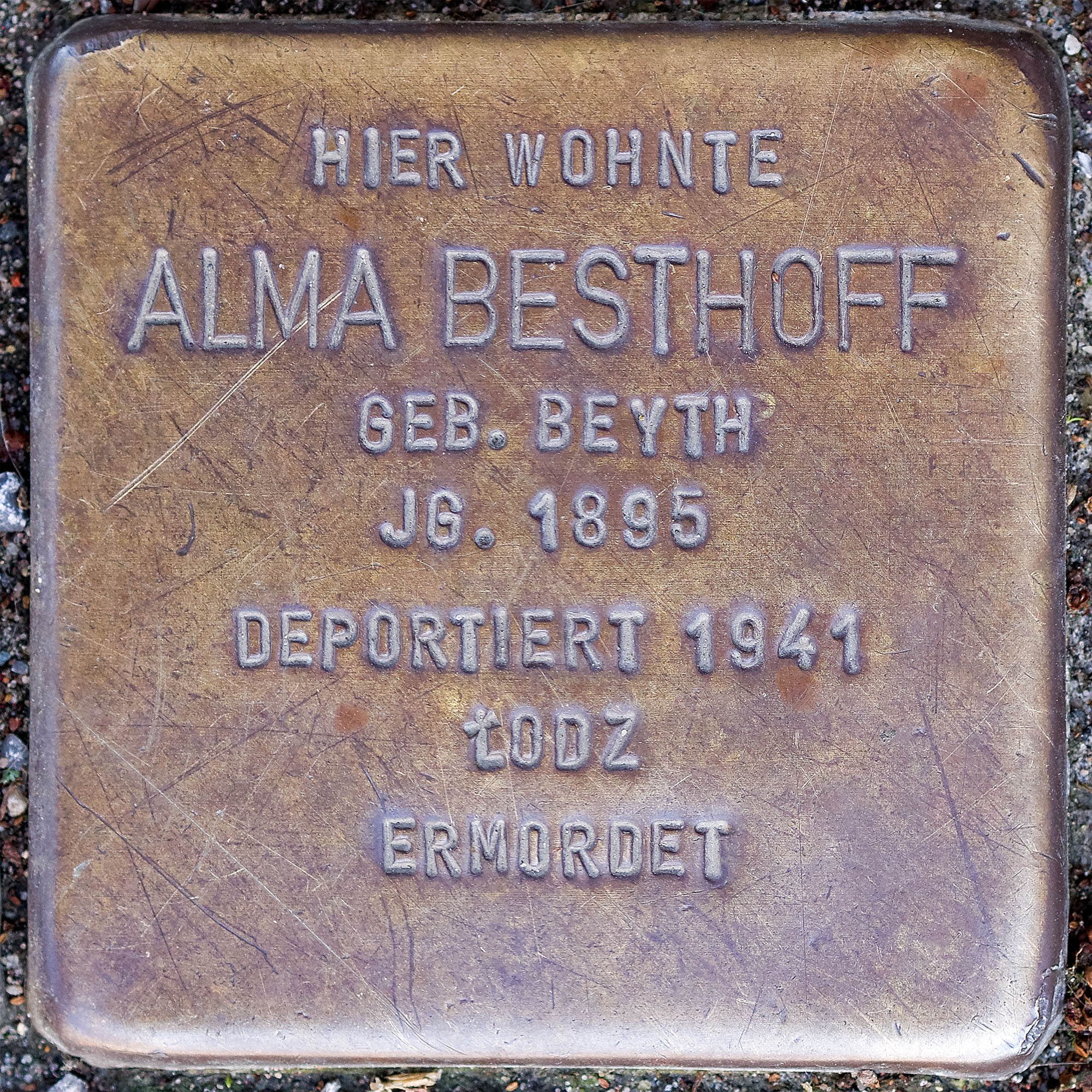 Stolpersteine MG: Besthoff, Alma